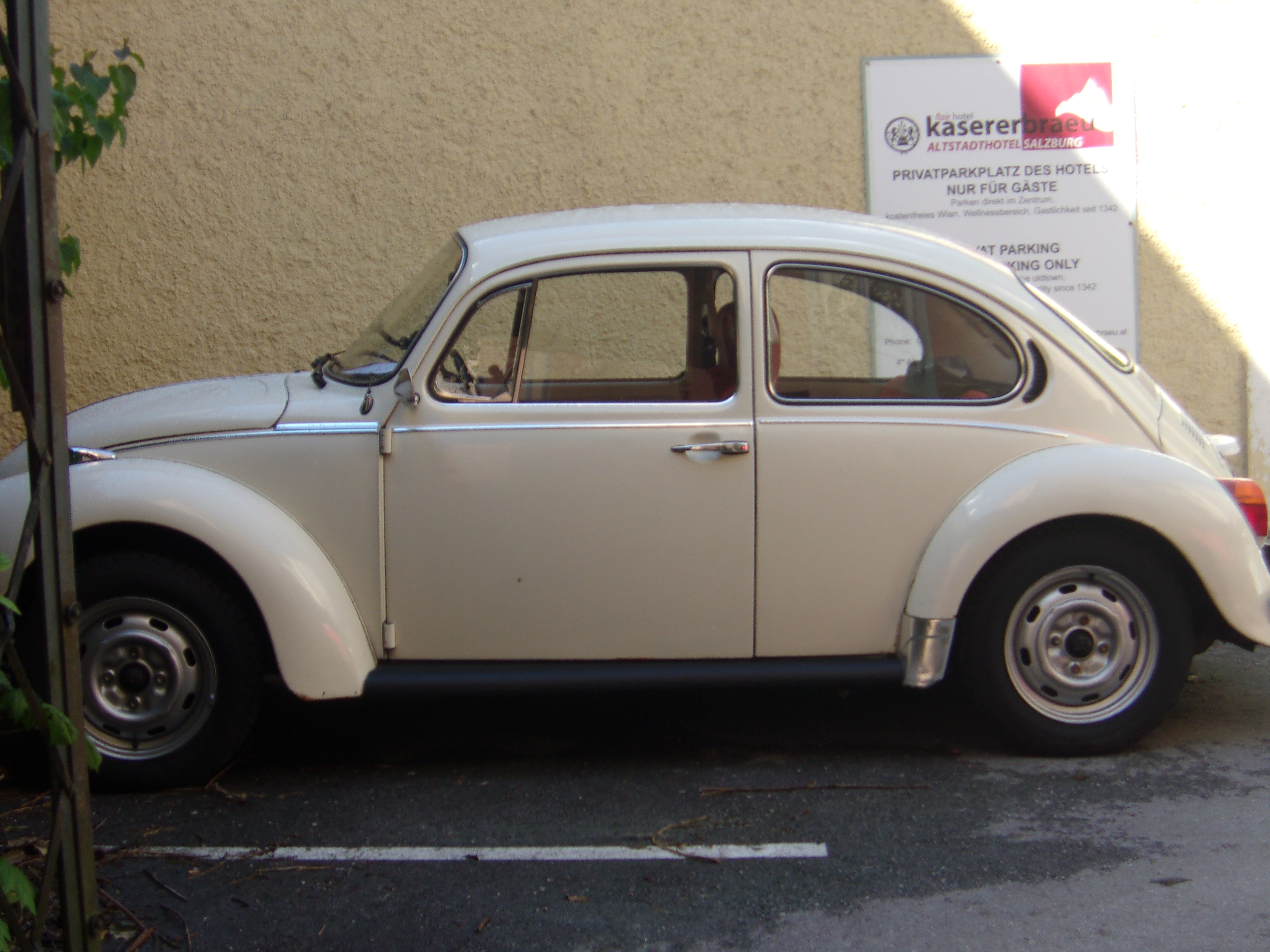 Biały Garbus spotkany na parkingu w Salzburgu.